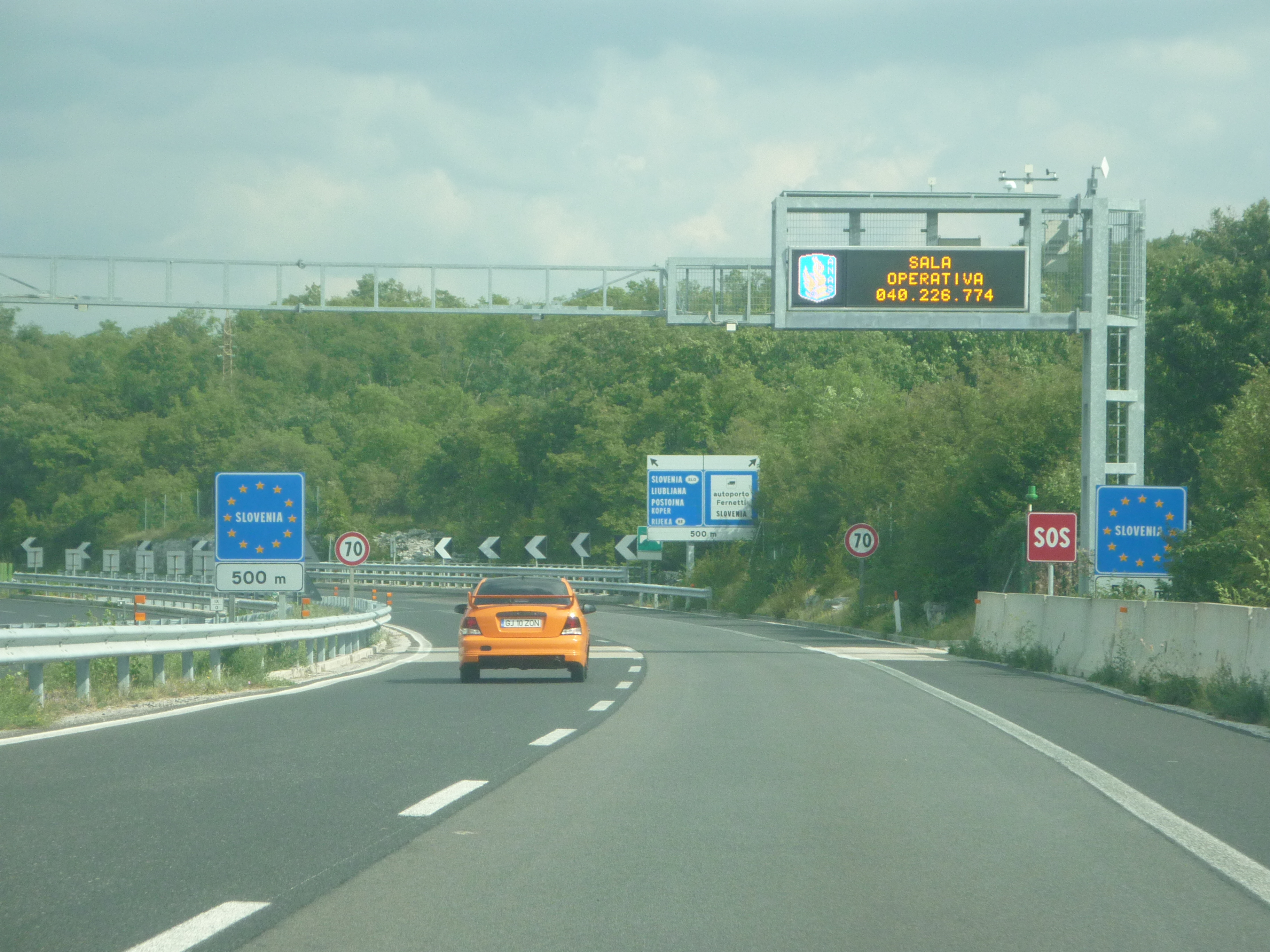 RA14